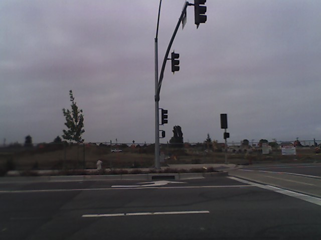 foto de construcción de nuevo target greatlands en la avenida macdonald en richmond california